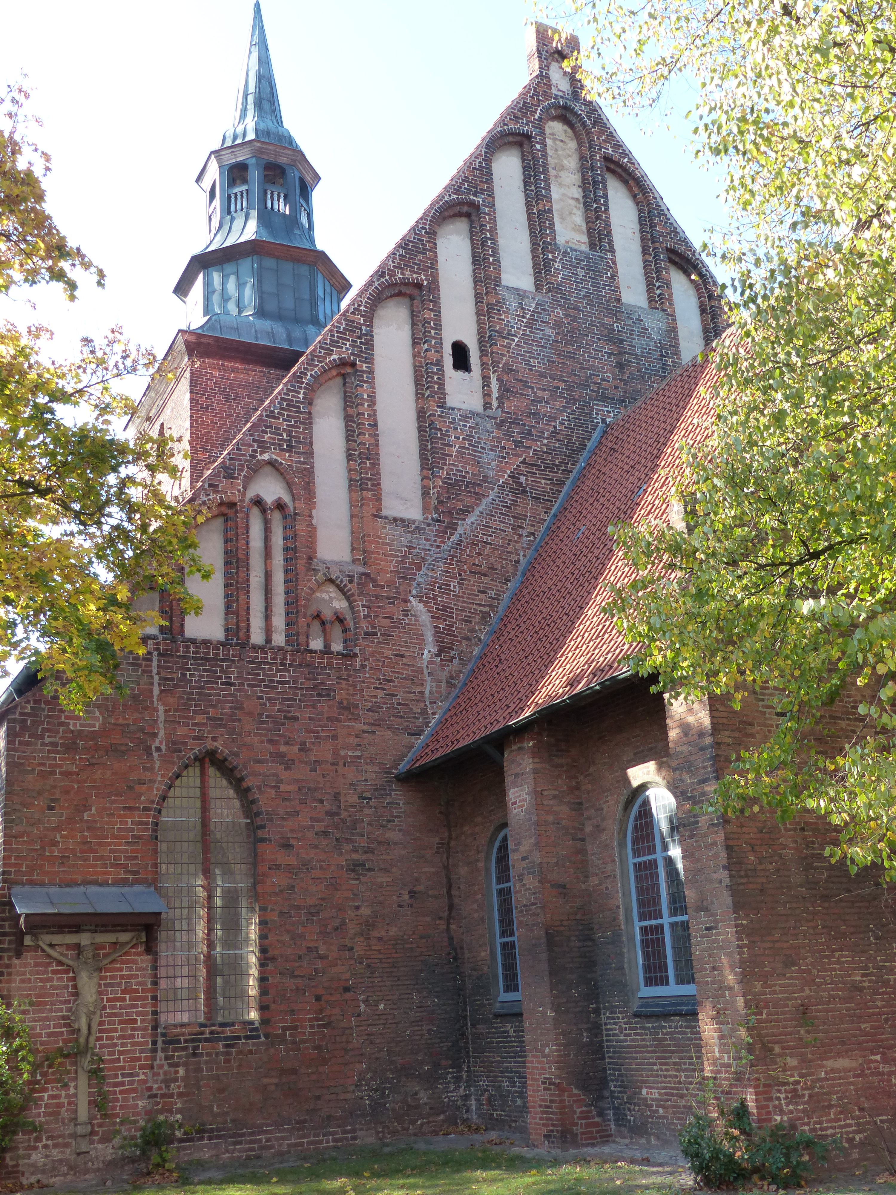 Verden, Johanniskirche, Ostgiebel und Chor von OSO